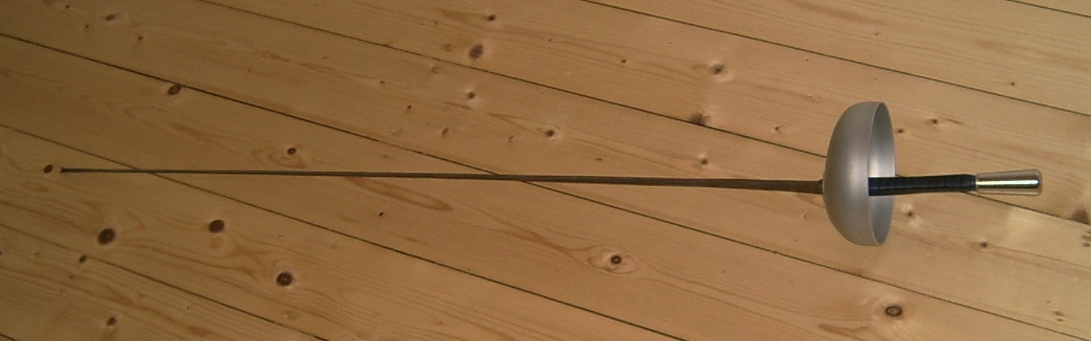 aktueller Sportdegen